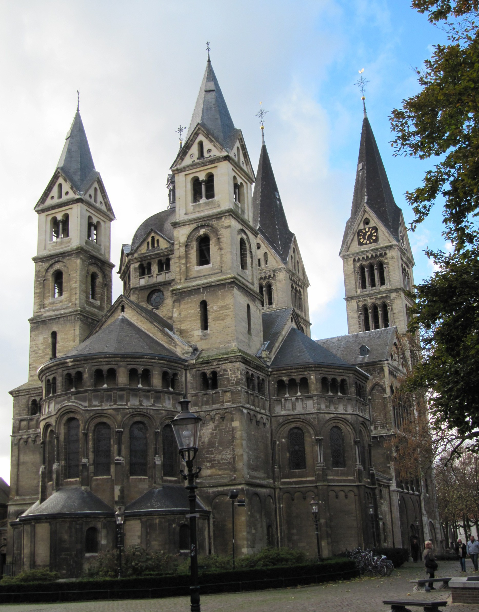 RM32582 Munsterkerk (foto 1).jpg